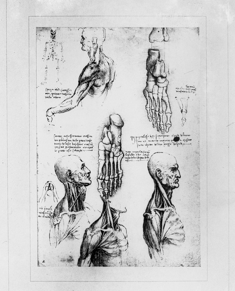 Anatomical Studies